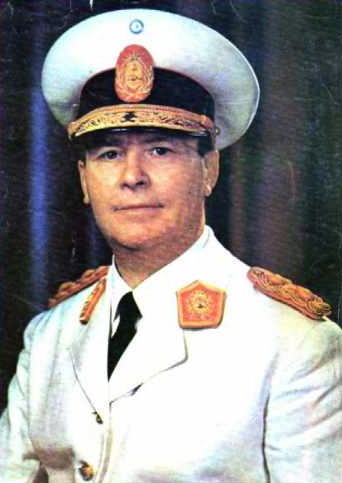 Es una foto del General Manuel Savio, pionero de la industria siderurgia argentina.